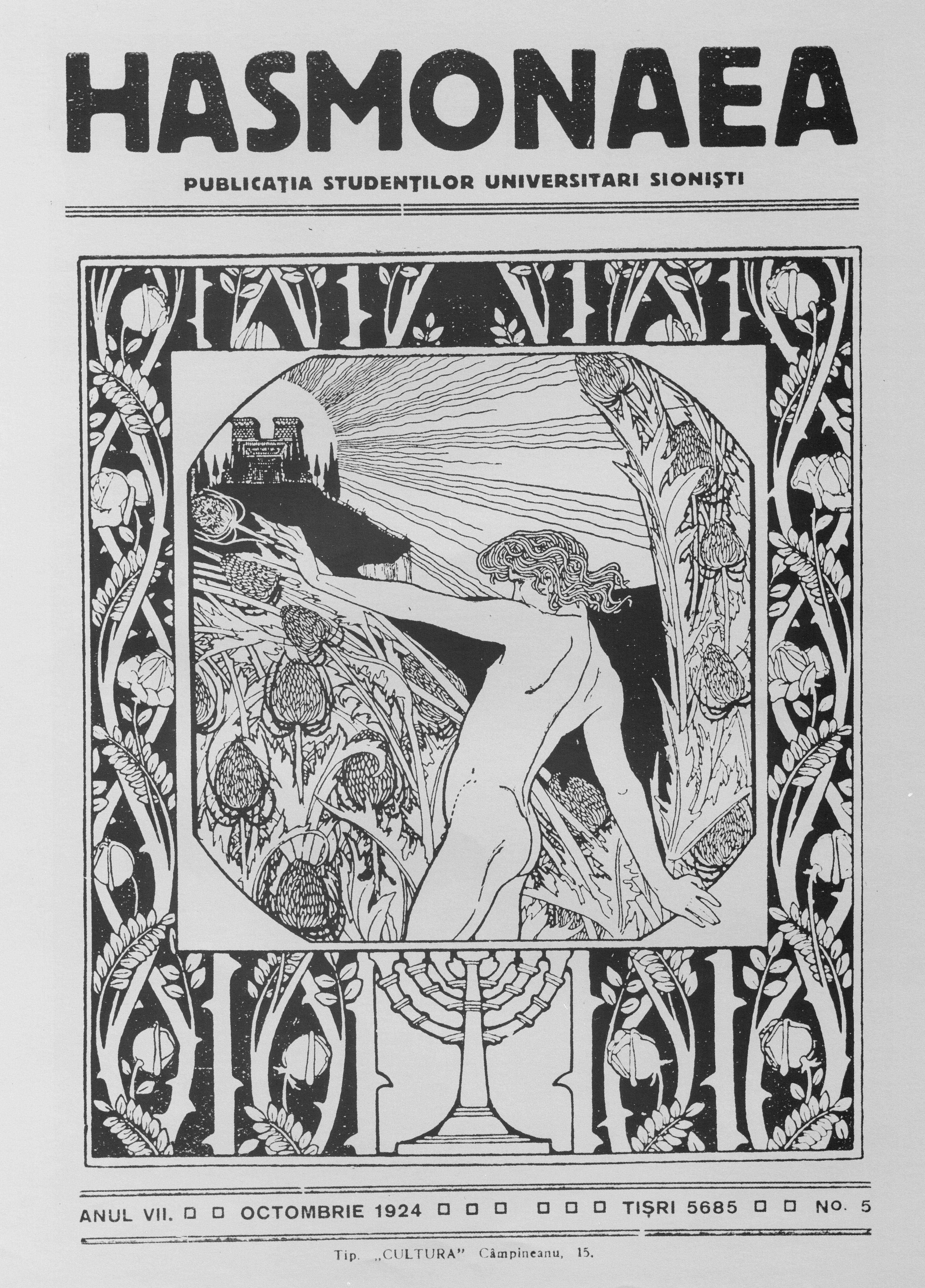 A zionist publication in Romania.